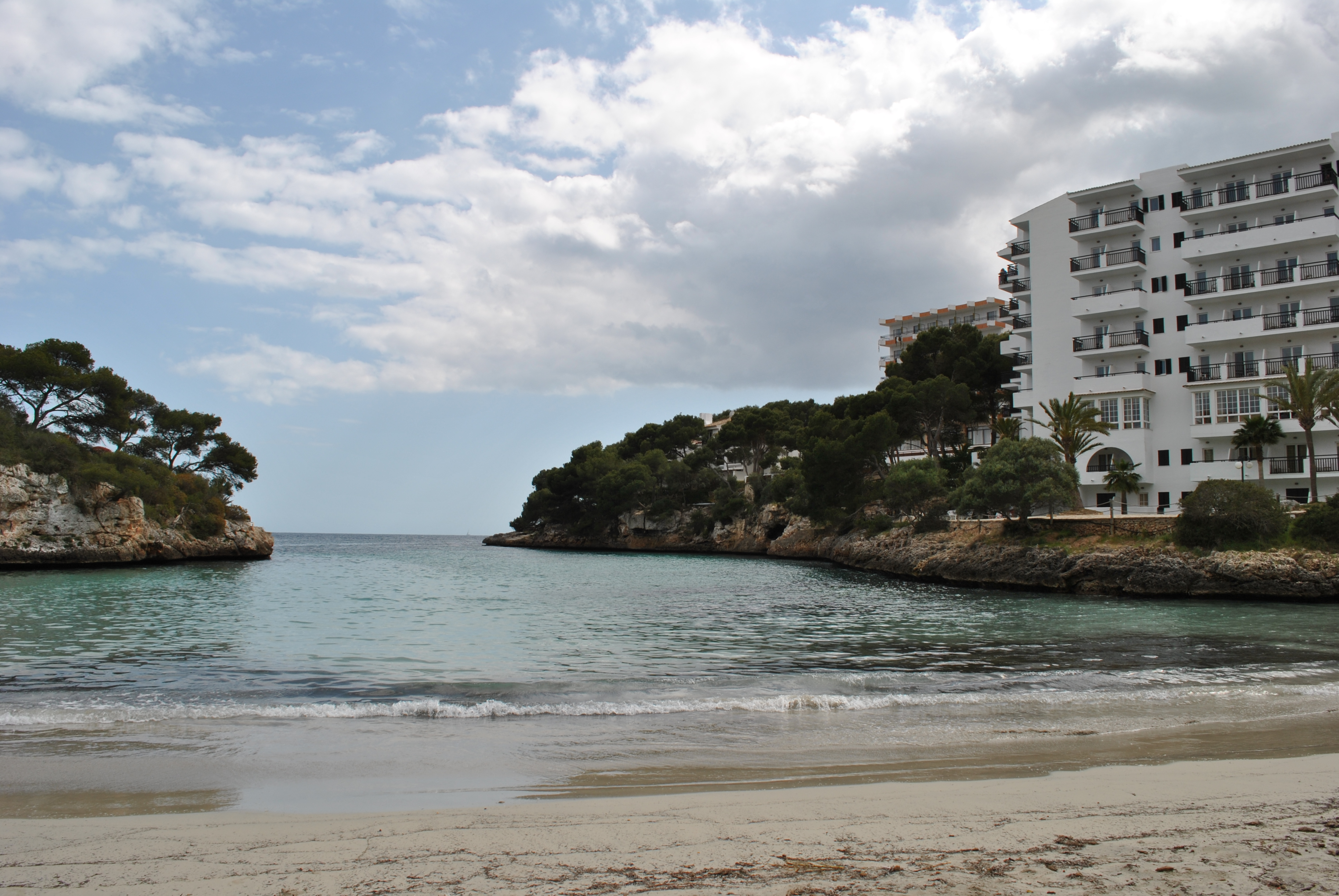 Cala Ferrera (Felanitx) This is a a photo of a beach in the Balearic Islands, Spain, with id: PL-IB-20008